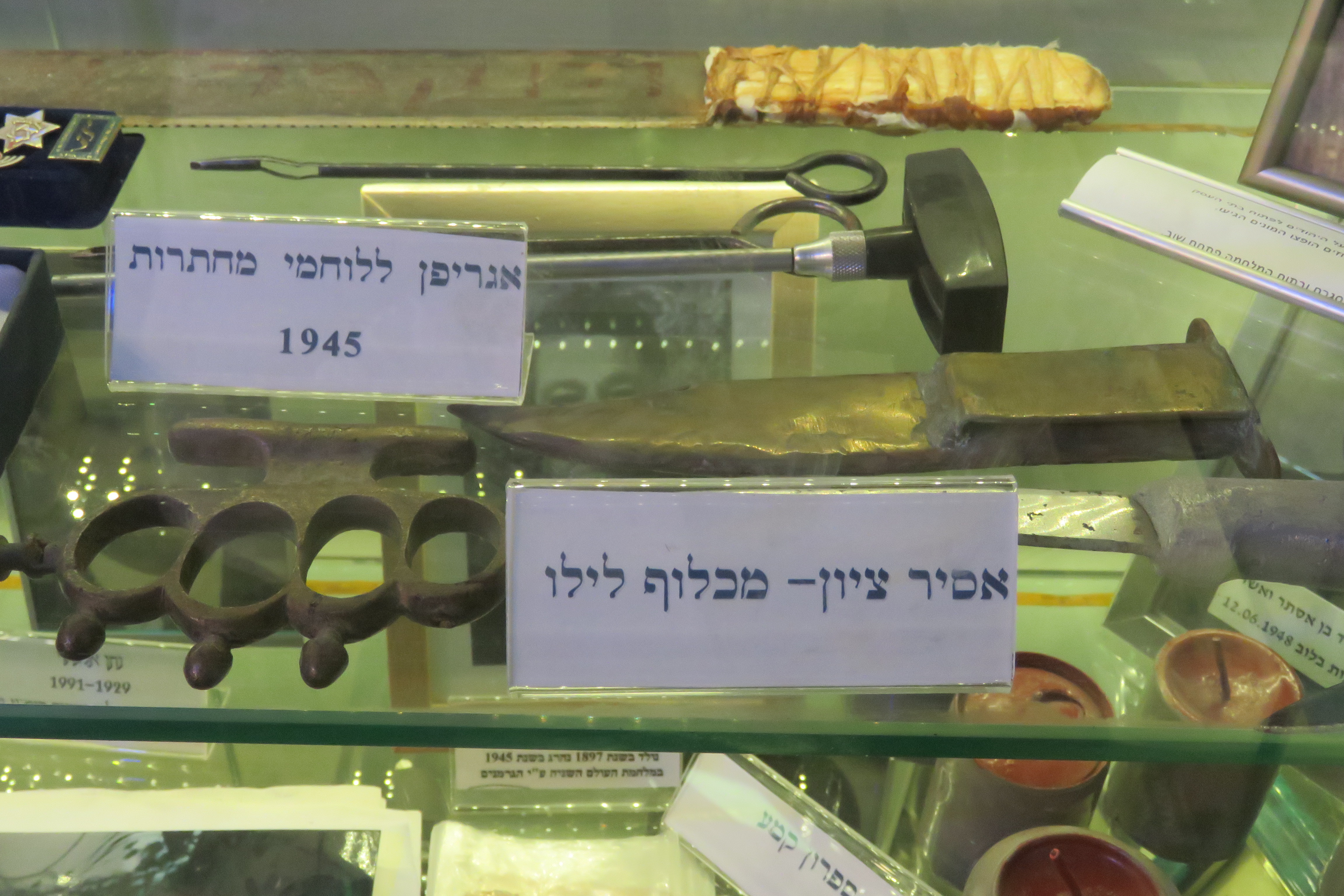 בתמונה רואים נשקים של לוחמי המחתרות ששרדו והוכנסו למוזיאון יהדות לוב